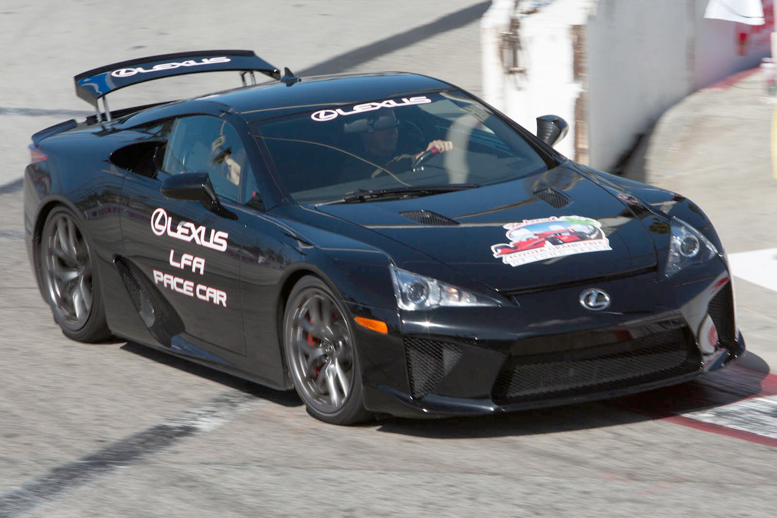 Lexus LFA Pace Car.